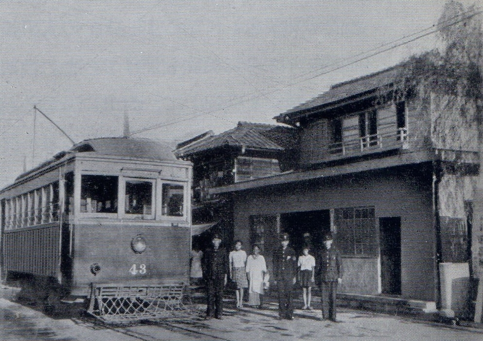 蘇東線と電車。正面の建物は起駅駅舎。